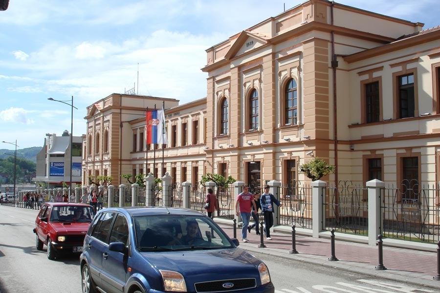 Гимназија Таковски устанак у Горњем Милановцу.